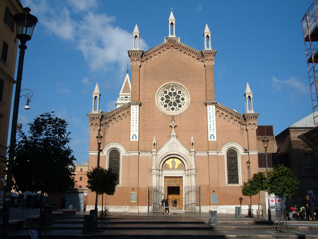 Chiesa di Santa Maria Immacolata e San Giovanni Berchmans, a Roma, nel quartiere Tiburtino.